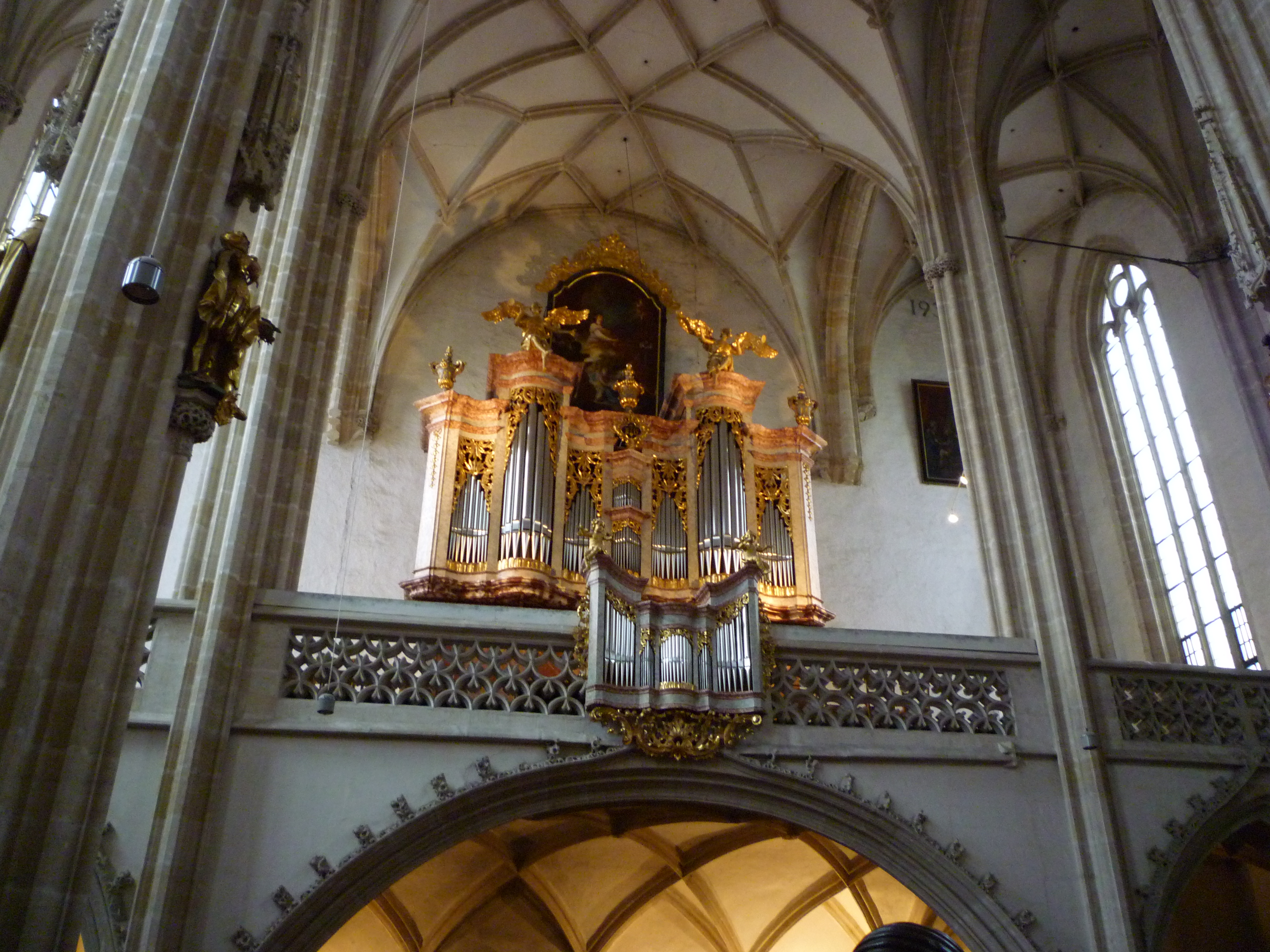 Orgel der Piaristenkirche Krems